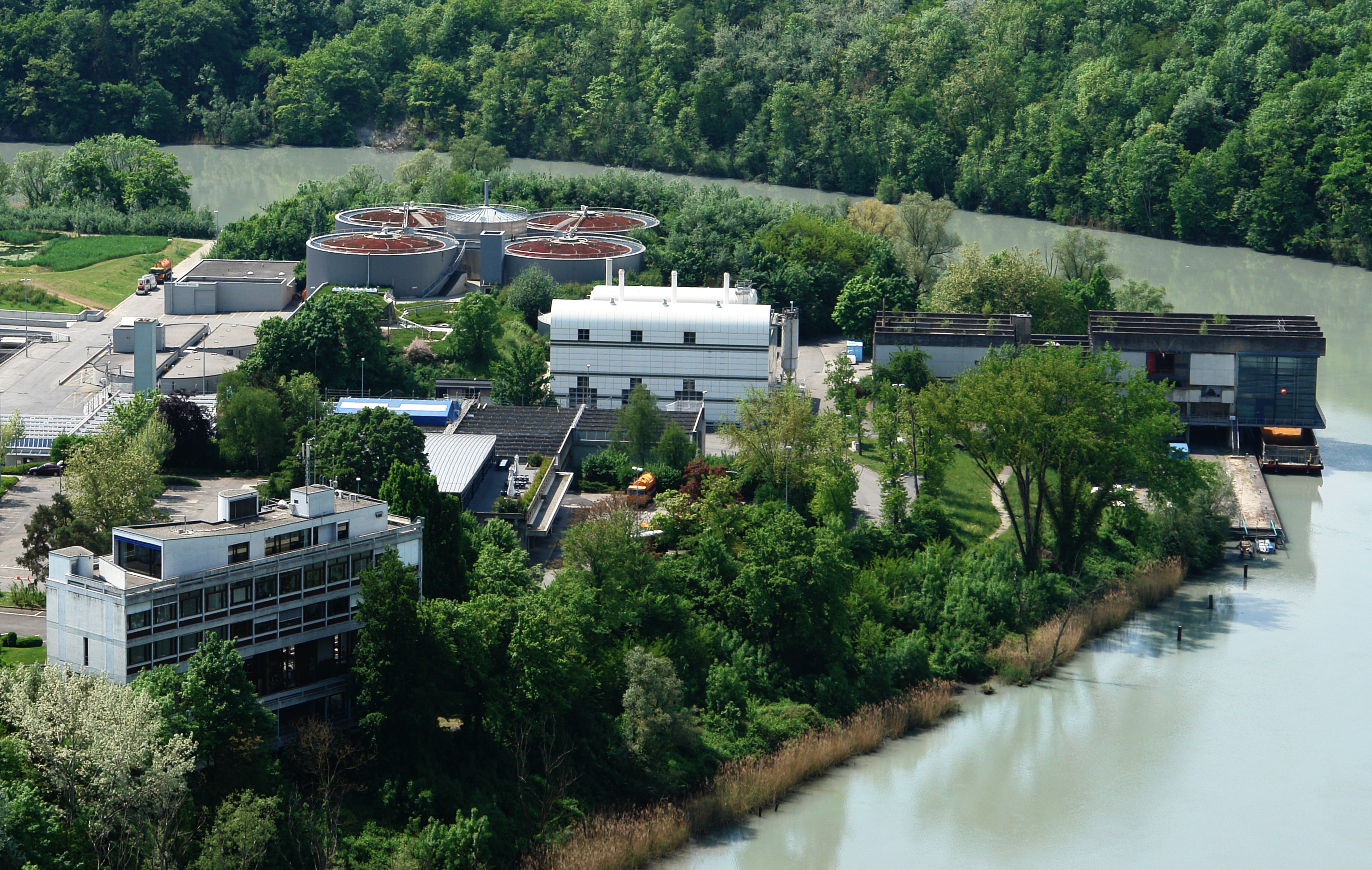 Sewage plant, Vernier, 1964-67 in Switzerland, Architect: Georges Brera